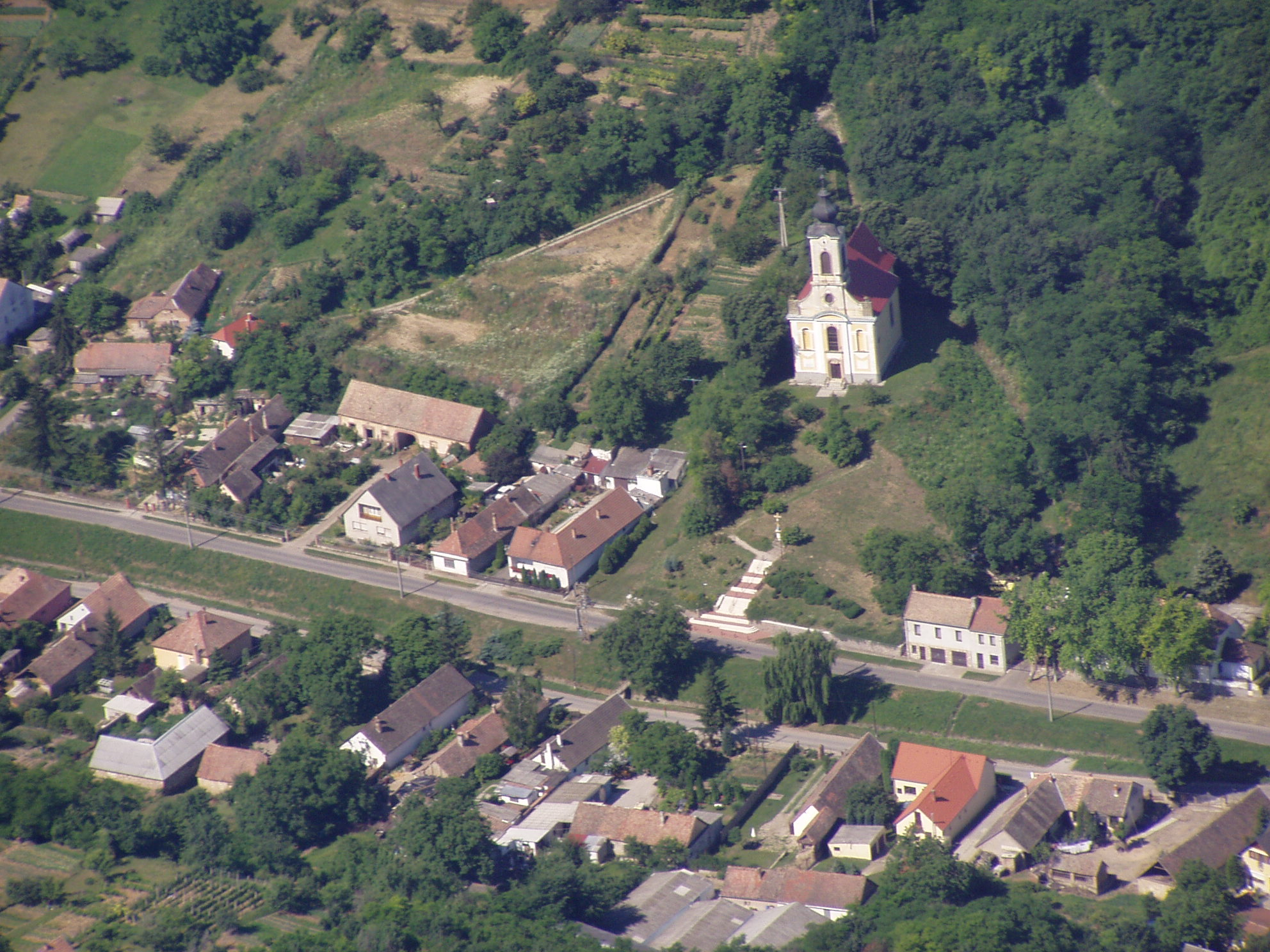 Keszüi római katolikus templom